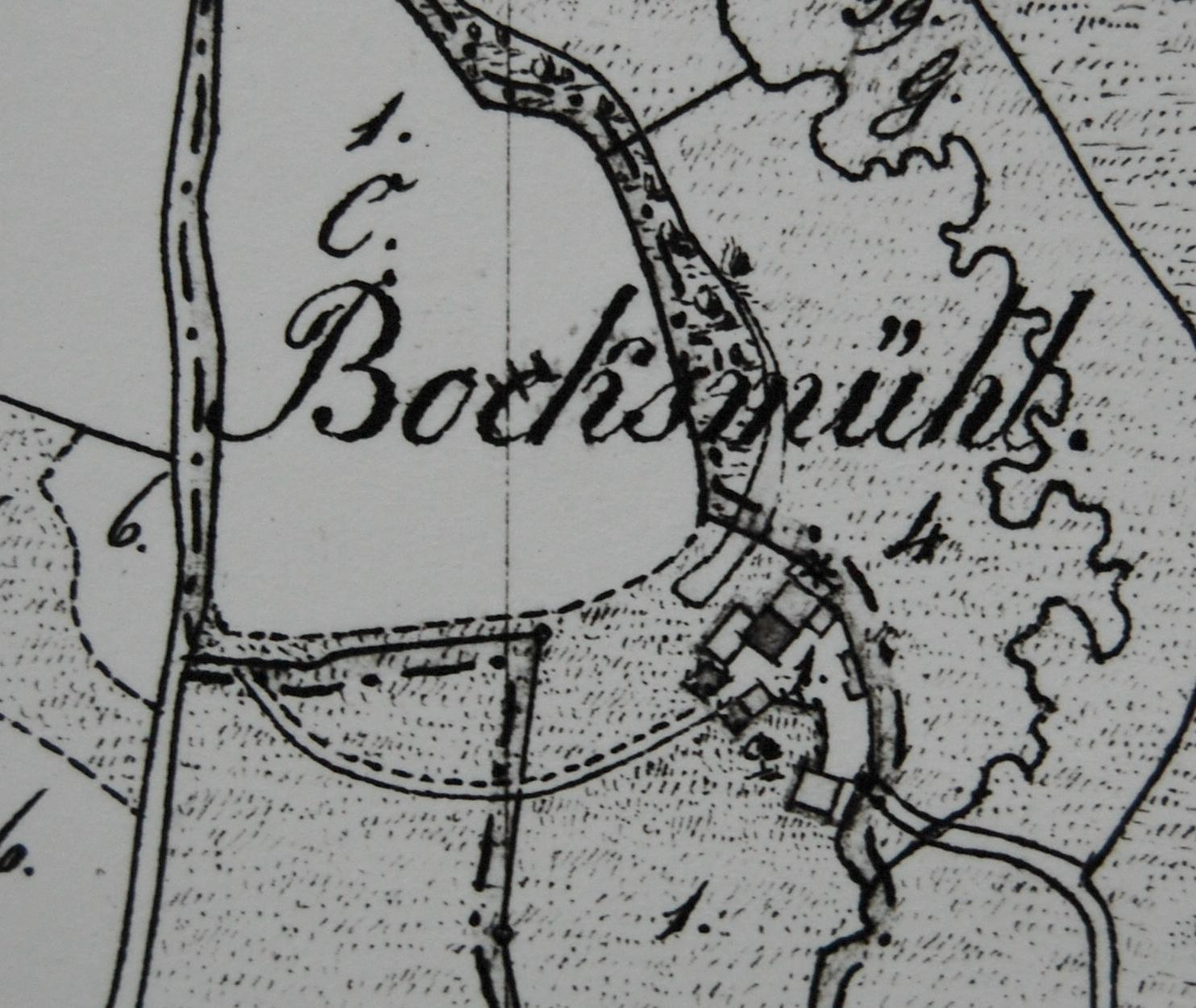 Boxmühle, Kartenausschnitt aus dem Jahre 1836